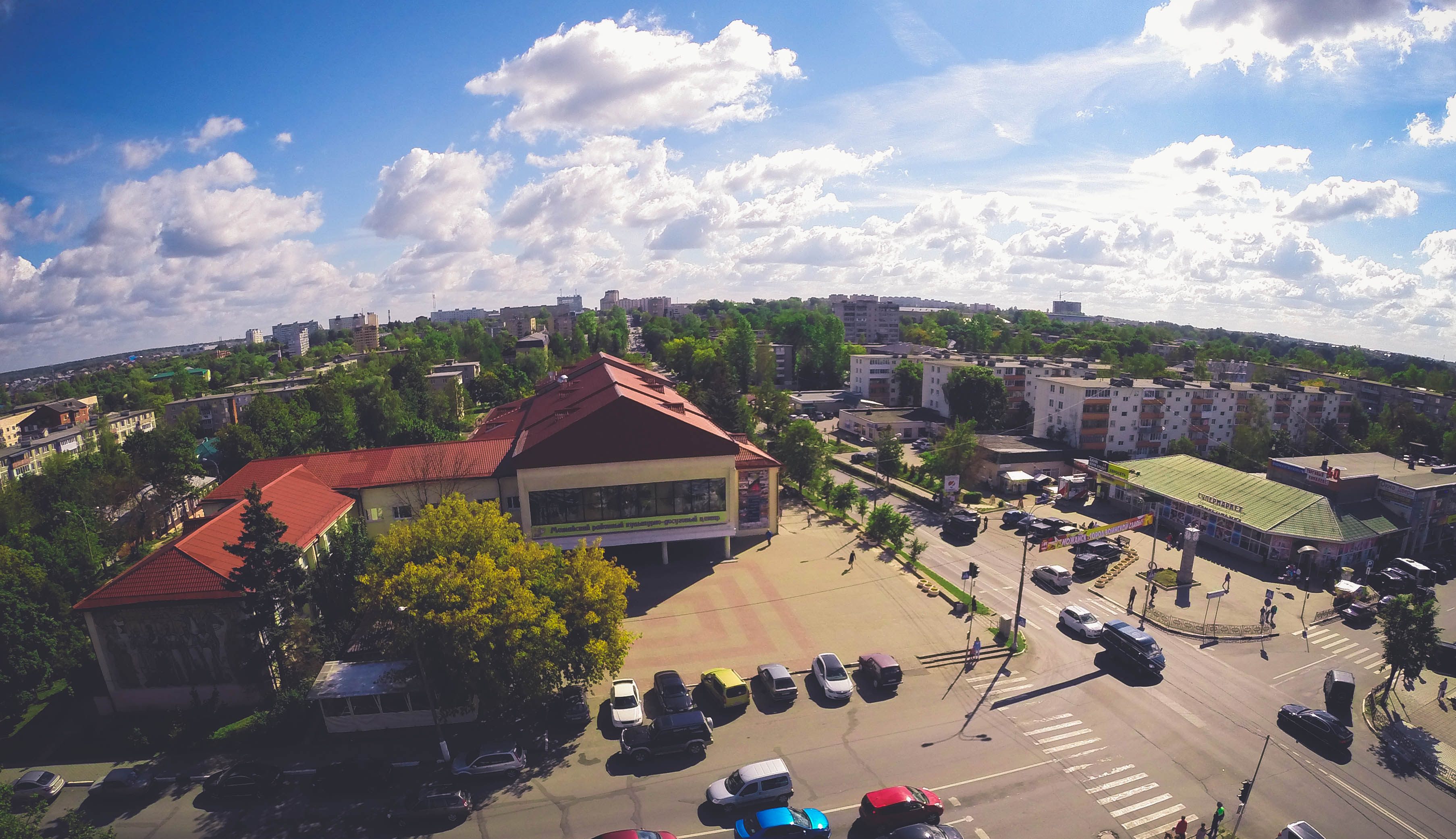 Районный культурно-досуговый центр. Можайск